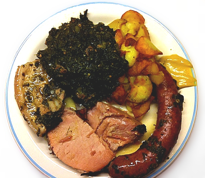 Grünkohlgericht aus der Norddeutschen Küche, bestehend aus: Grünkohl mit Kassler, „Kochwurst“ (eigentlich geräuchertes Mettende), Schweinebacke, „süße“ (leicht karamellisierte) Bratkartoffeln und Senf. Grünkohlgerichte in derartiger Zusammenstellung sind typisch für die Schleswig-Holsteiner Küche, aber auch in anderen Teilen Norddeutschlands weit verbreitet (dann meist mit üblichen, „nicht gesüßten“ Bratkartoffeln, oder auch mit Salzkartoffeln).